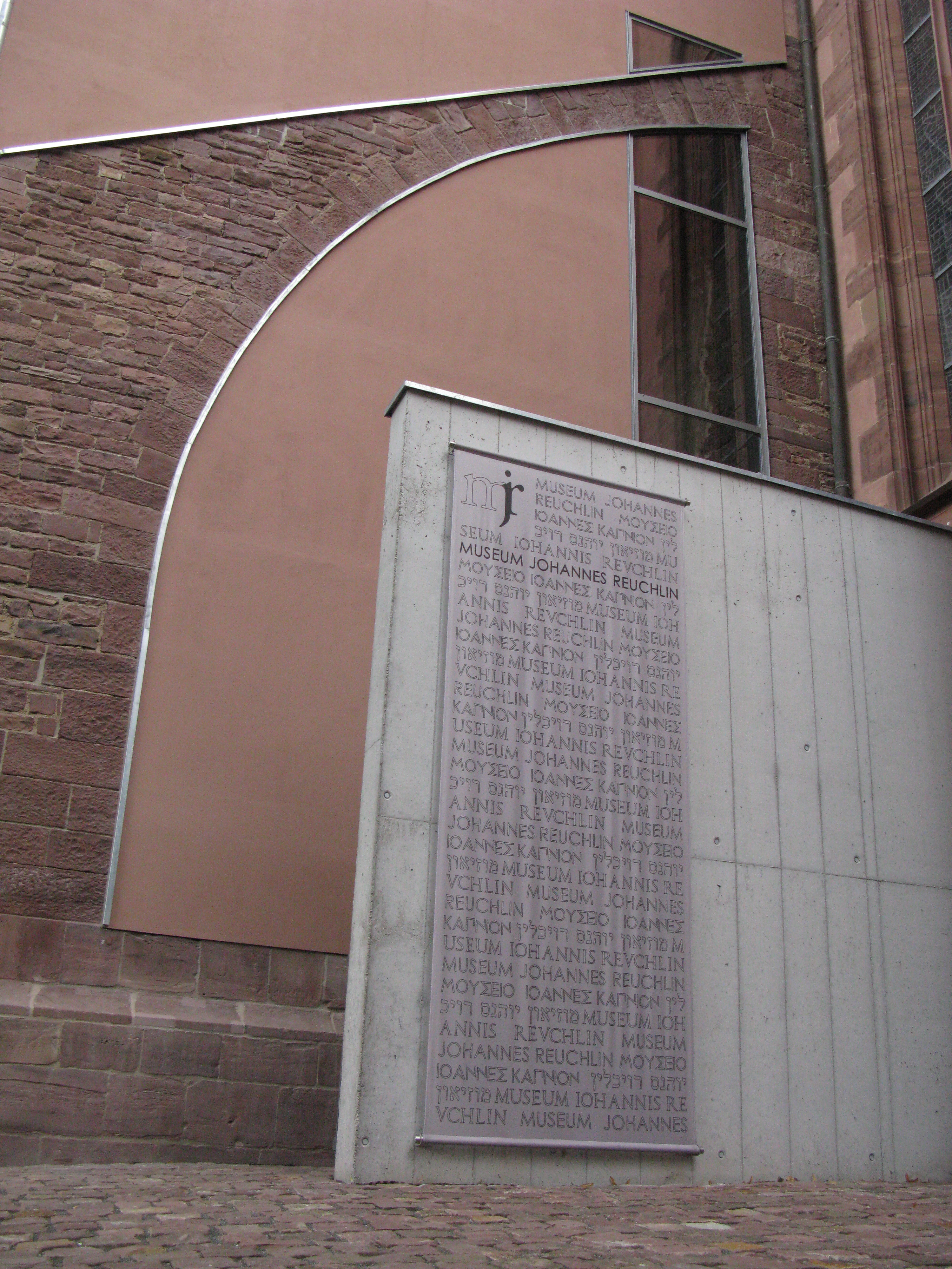 Das neue Museum Johannes Reuchlin an der Schlosskirche Pforzheim